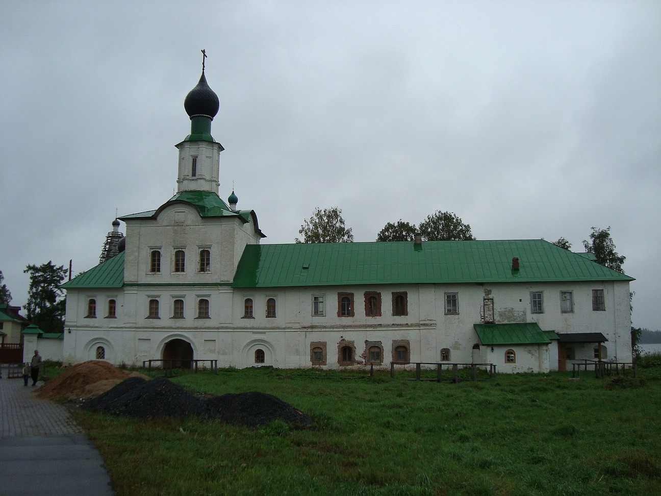 Надвратная Сергиевская церковь Сийского монастыря, 1661-87, 1699